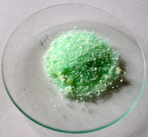 FeSO4